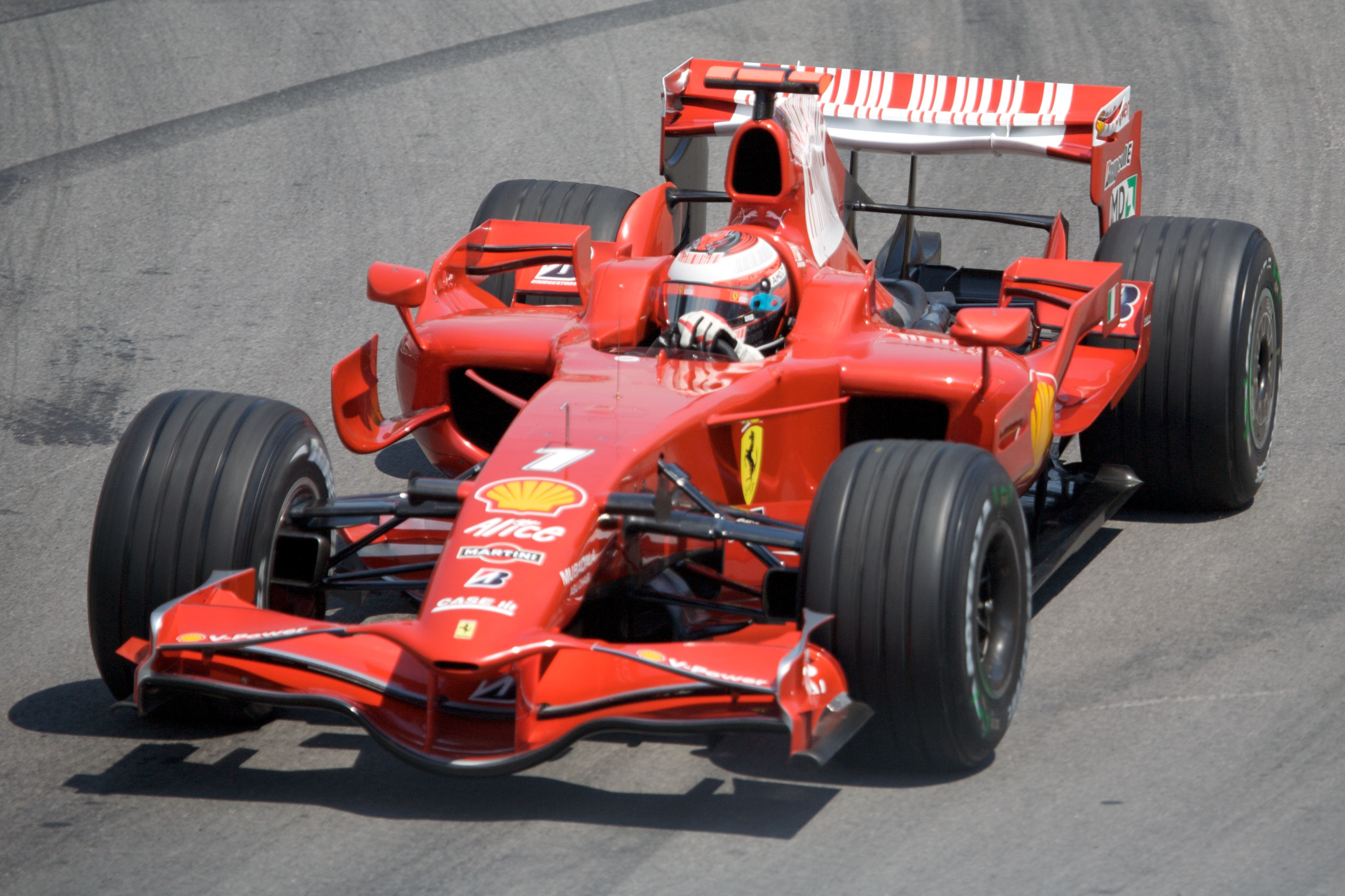 Raikkonen at Canada 2008